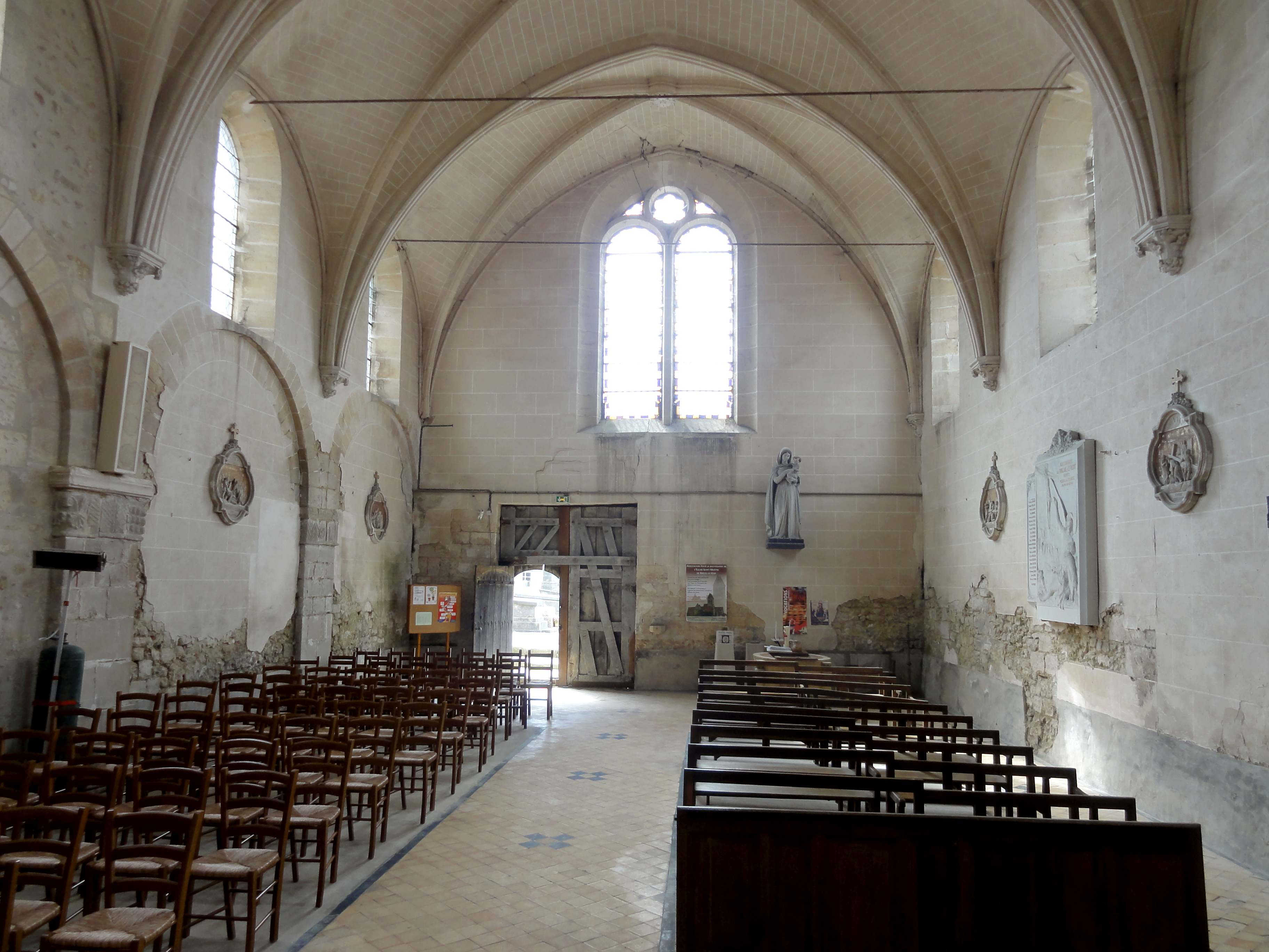 Intérieur de l'église - voir titre.